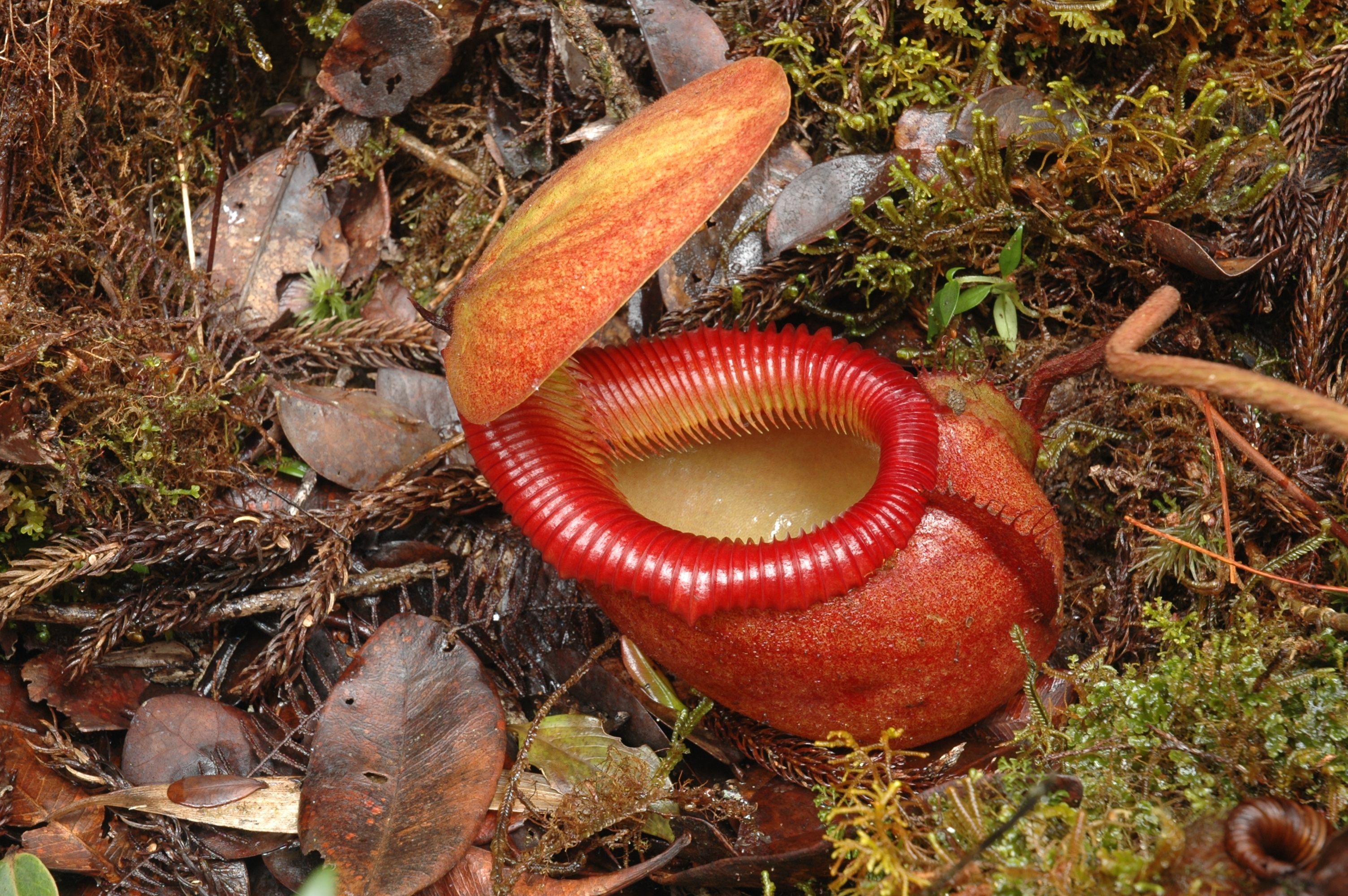 Nepenthes × kinabaluensis young plant Kinabalu by Jeremiah Harris